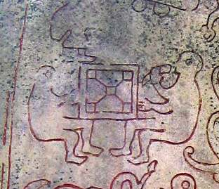 Kopia av den förstörda runstenen Gs 19 vid Ockelbo kyrka. Detalj.